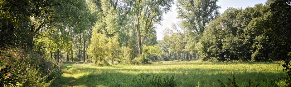 Pleisbachtal Grünes C